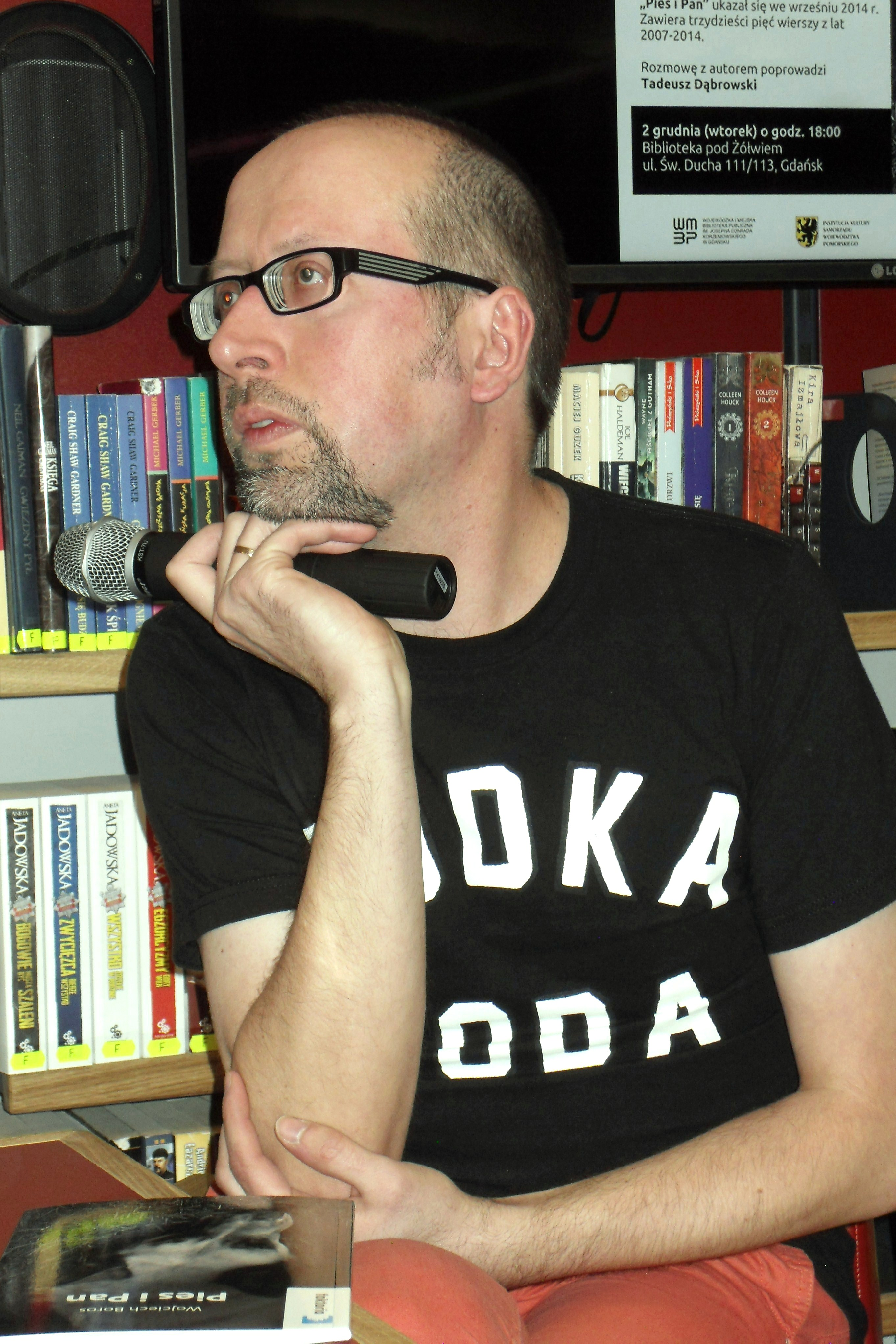 Wojciech Boros, gdański poeta.